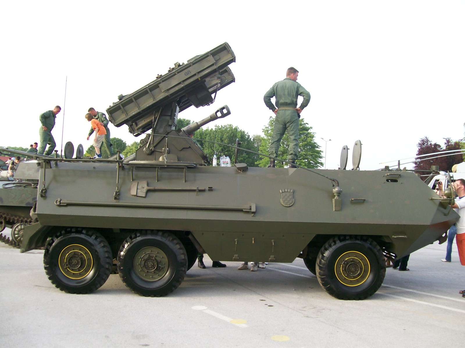 Strijela - 10CROA1